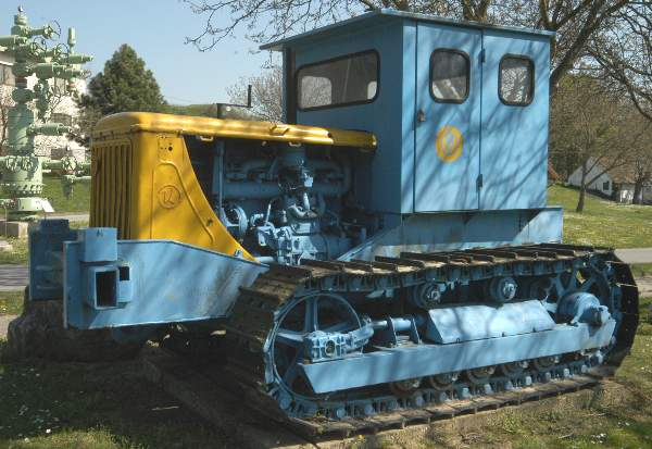 Raupenschlepper Stalinec C-80 der ÖMV, Baujahr 1953